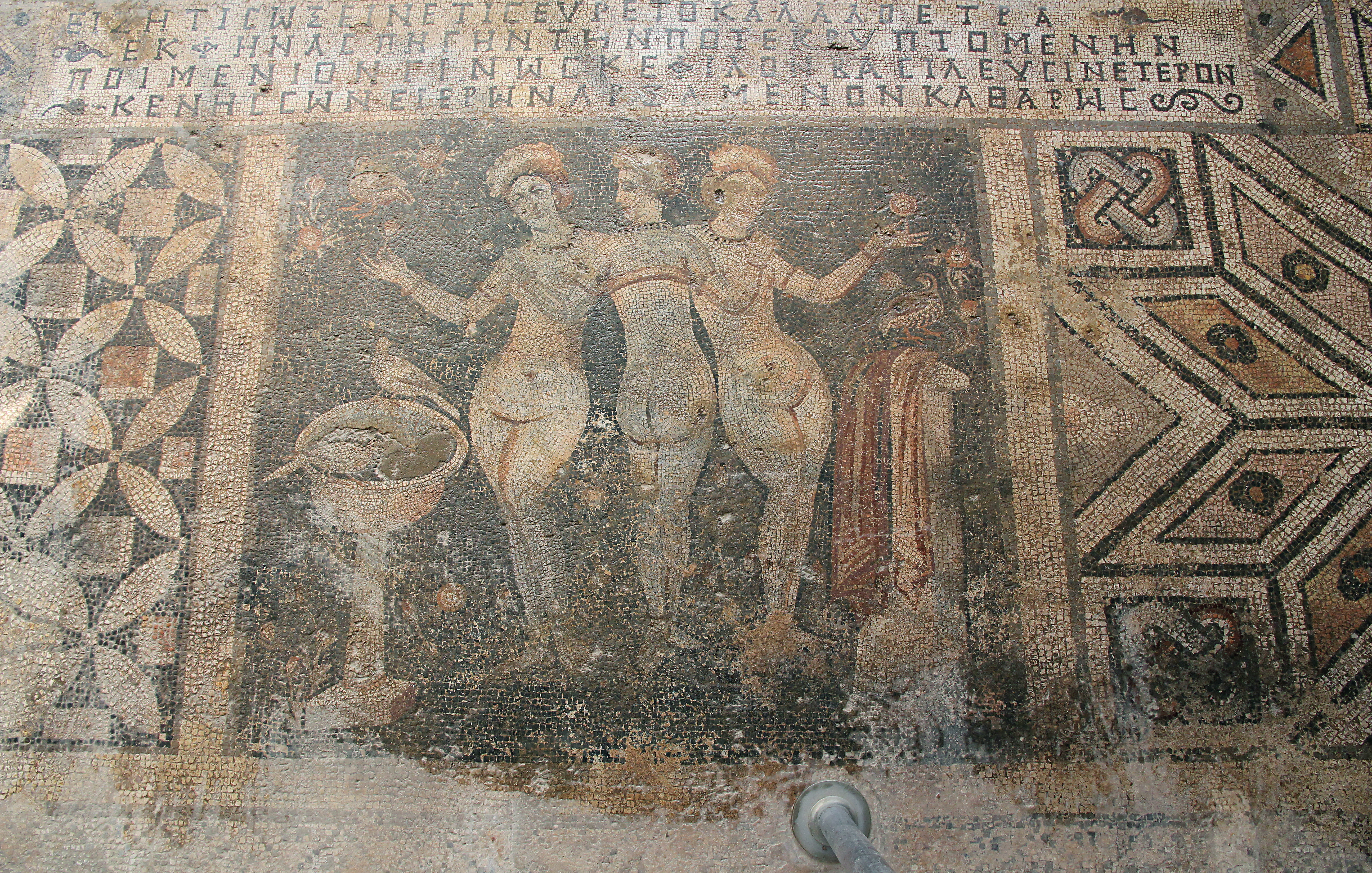 Mosaik der Drei Grazien in Narlikuyu bei Silifke, Südtürkei